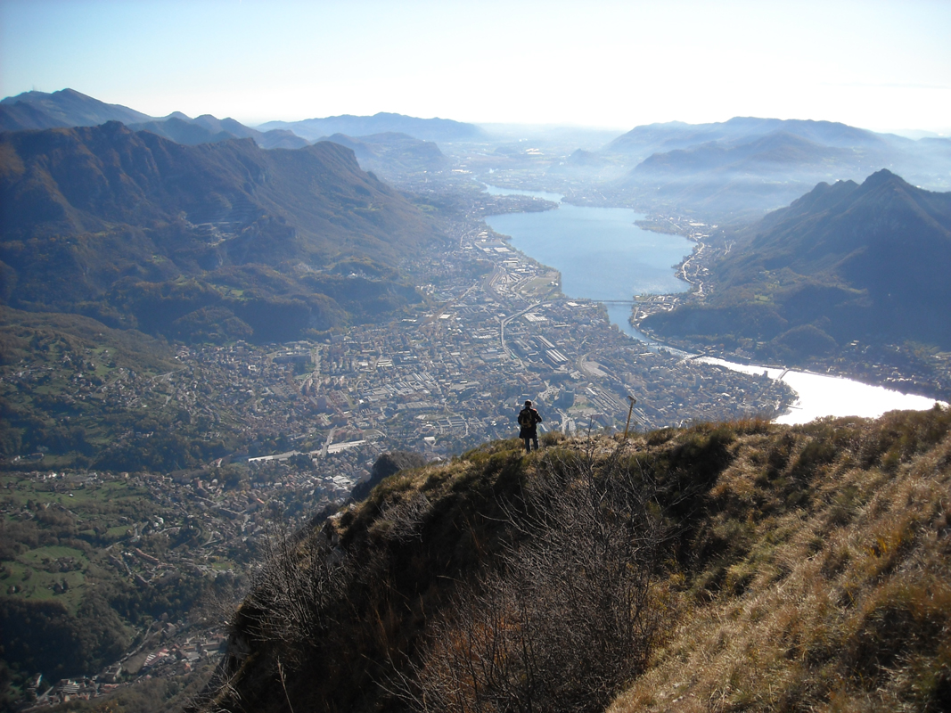 La città di Lecco ed il lago di Garlate visti dal Pian dei Resinelli.